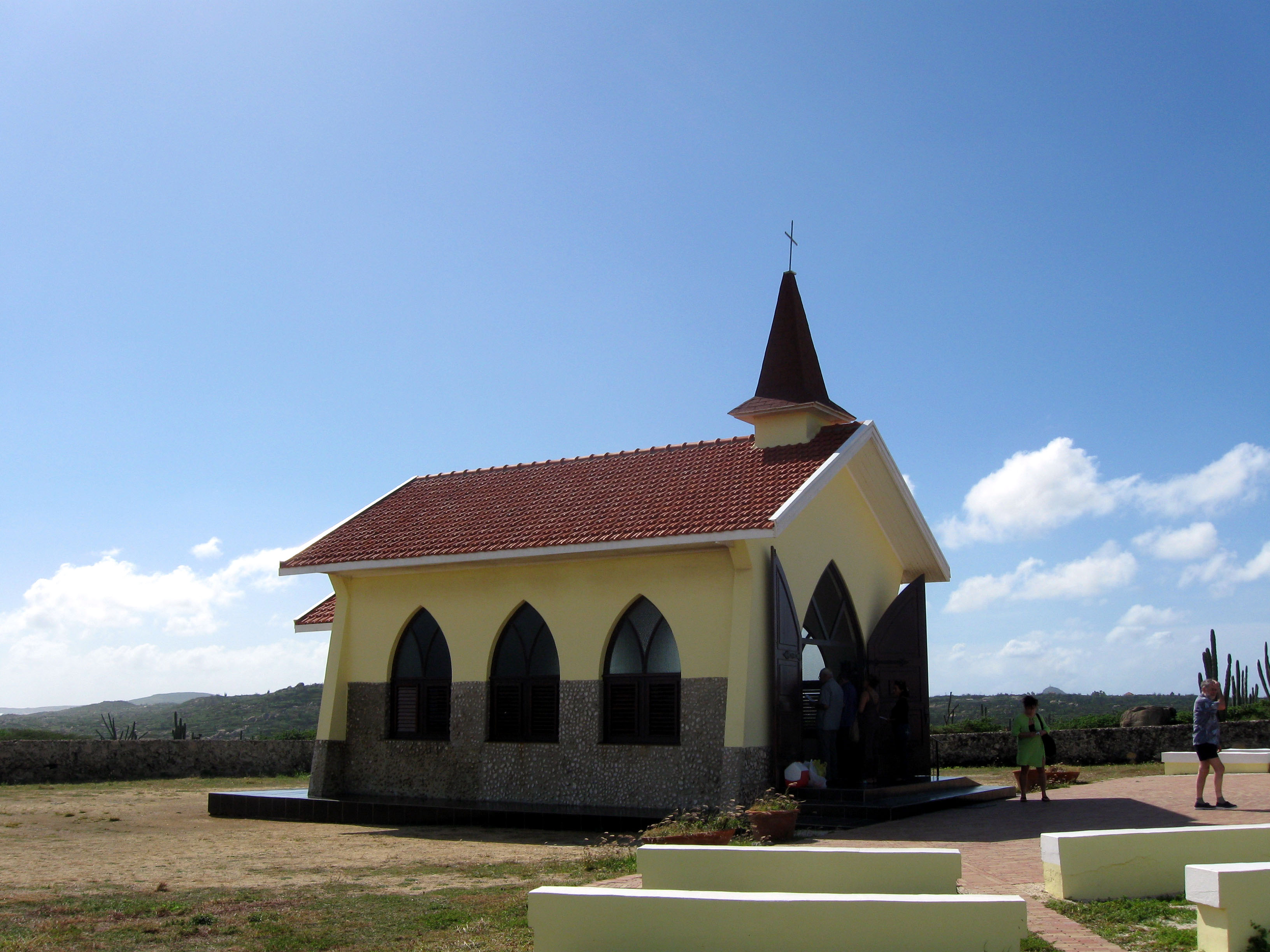 Alto Vista Chapel, Aruba